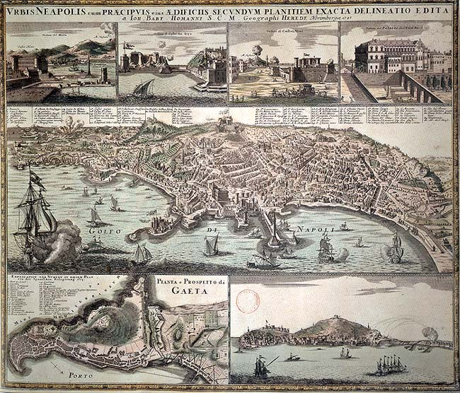 Johann Baptist Homann, Mappa di Napoli e Gaeta, incisione, 1727. Veduta panoramica della città dal mare, arricchita in alto da quattro piccole vedute particolari della città, ed in basso dalla veduta generale e pianta di Gaeta. Seconda versione della veduta di Homann, con l’inserimento delle vedute di Gaeta in basso al luogo di quelle di Napoli. Da un punto di vista cartografico la pianta è ispirata alla prima edizione del Petrini, 1698, mentre le vedute derivano sempre dal Petrini e dal Sarnelli. Incisione in rame, Dimensioni: 574x484. Bibliografia: Grimaldi 92.